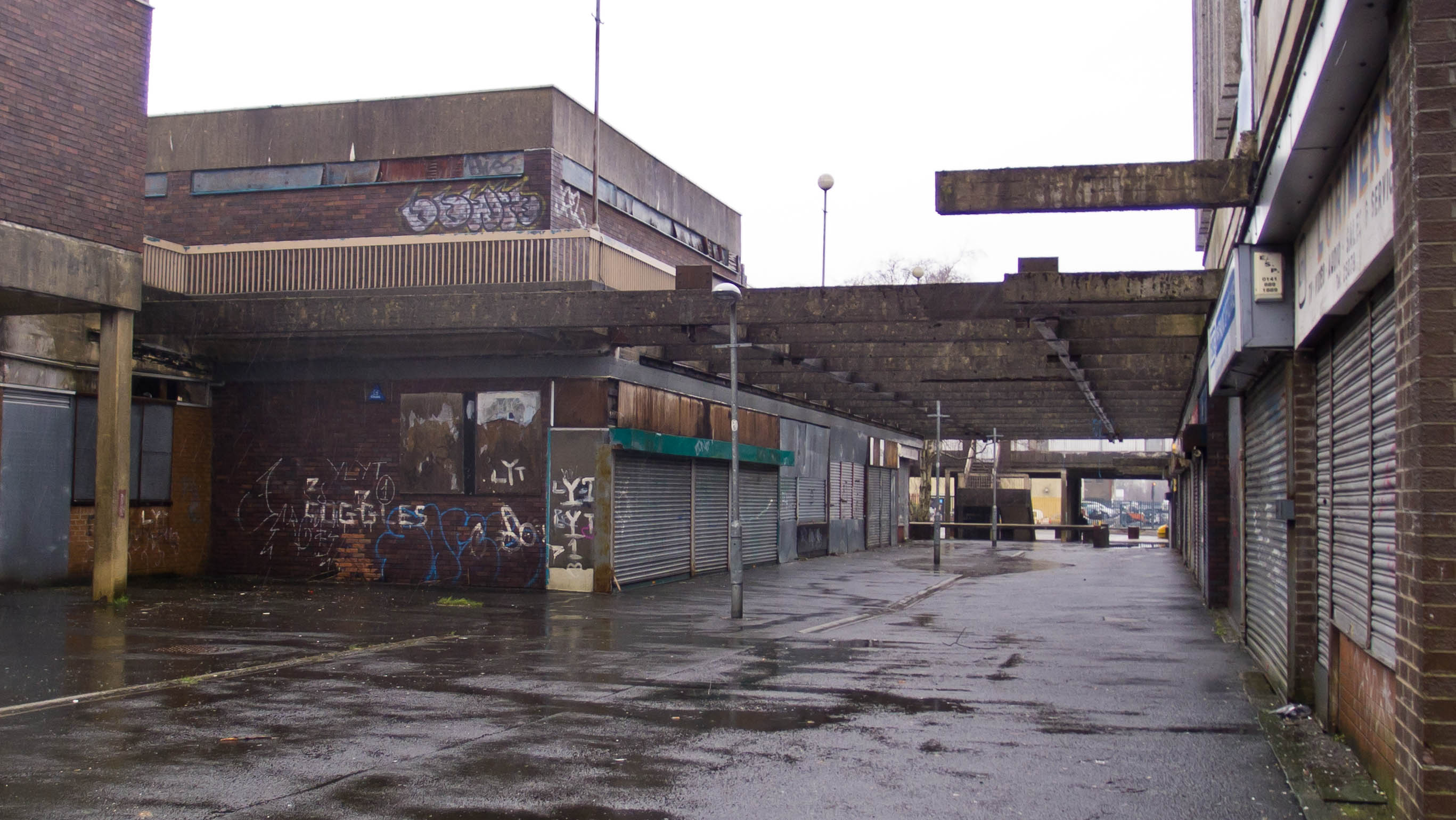 Linwood derelict shopping centre